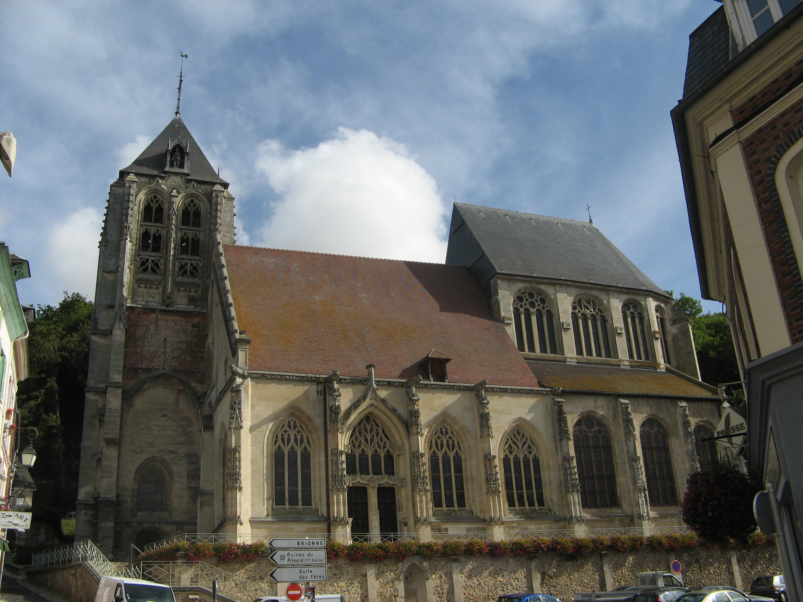 Église Saint-Nicolas, Beaumont-le-Roger